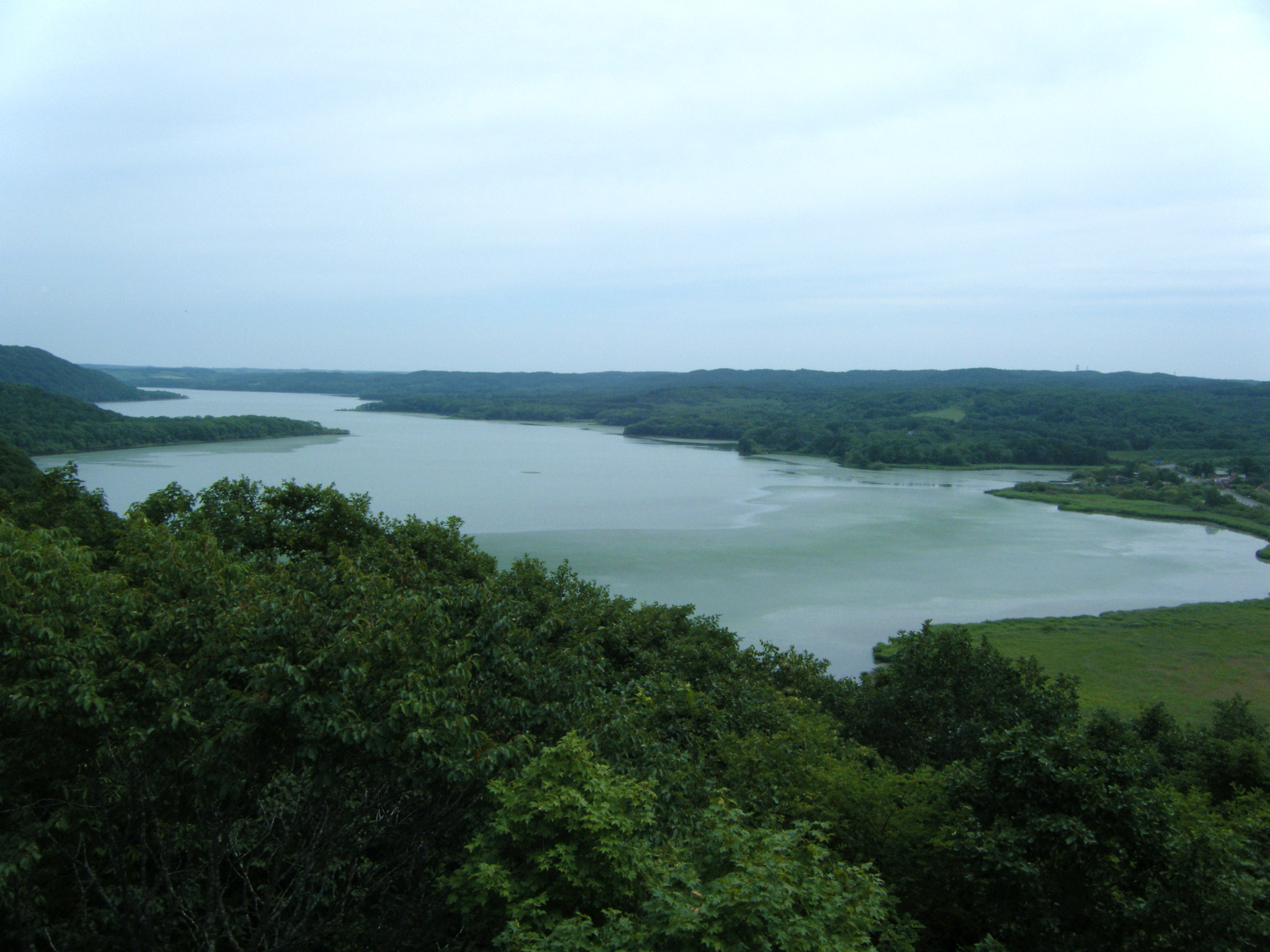 塘路湖 サルボ展望台より撮影